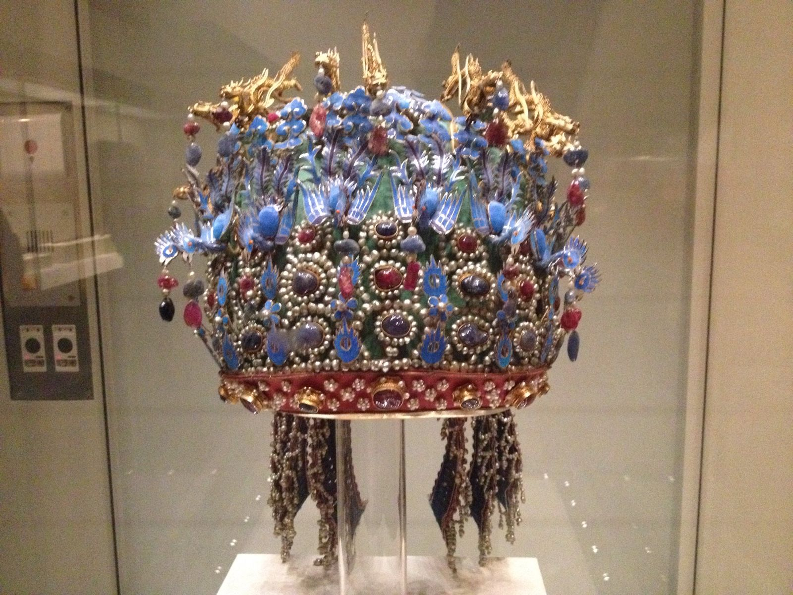 展示于中国国家博物馆的明代皇后礼服冠，出土于明神宗定陵，为明神宗孝端显皇后王喜姐的凤冠。